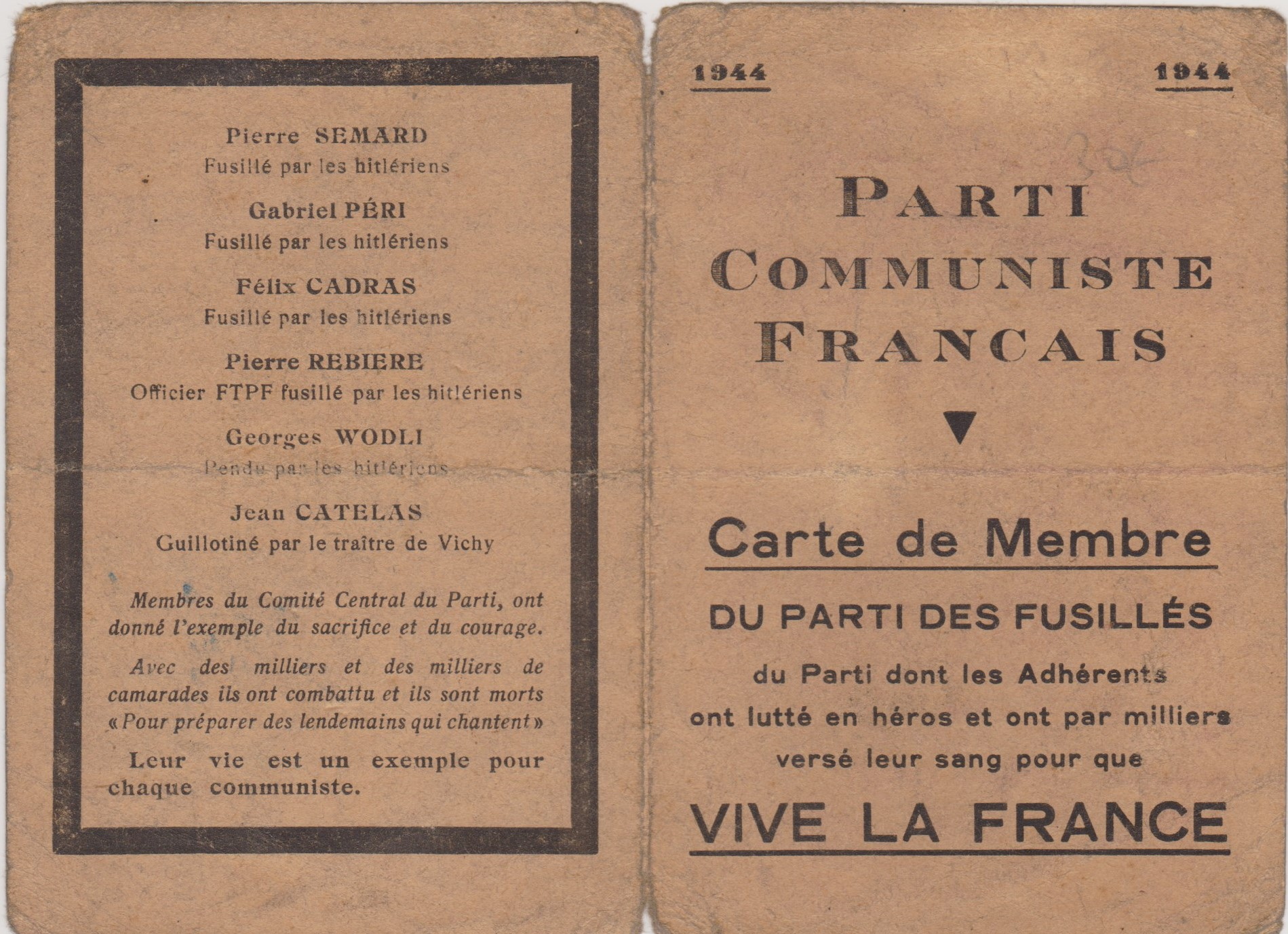 Carte mentionnant "le Parti des fusillés" (sans citer de chiffres exacts) et nommant six membres du Comité central fusillés ou tués par les nazis ou "le traitre de Vichy" : Pierre Semard, Gabriel Péri, Félix Cadras, Pierre Rebière, Georges Wodli, Jean Catelas. Carte utilisée de septembre à décembre 1944. La mort des deux autres membres du comité central n'est pas connue lorsque la carte est éditée.